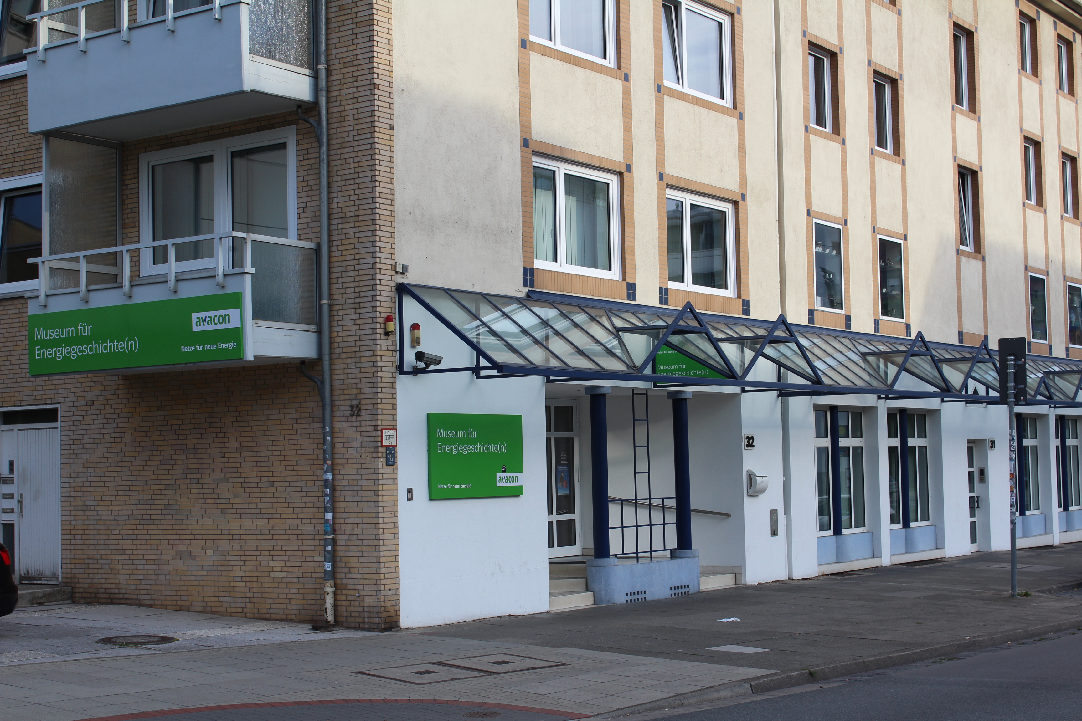 Außenansicht des Museums für Energiegeschichte(n) in der Humboldtstr. 32 in 30169 Hannover.